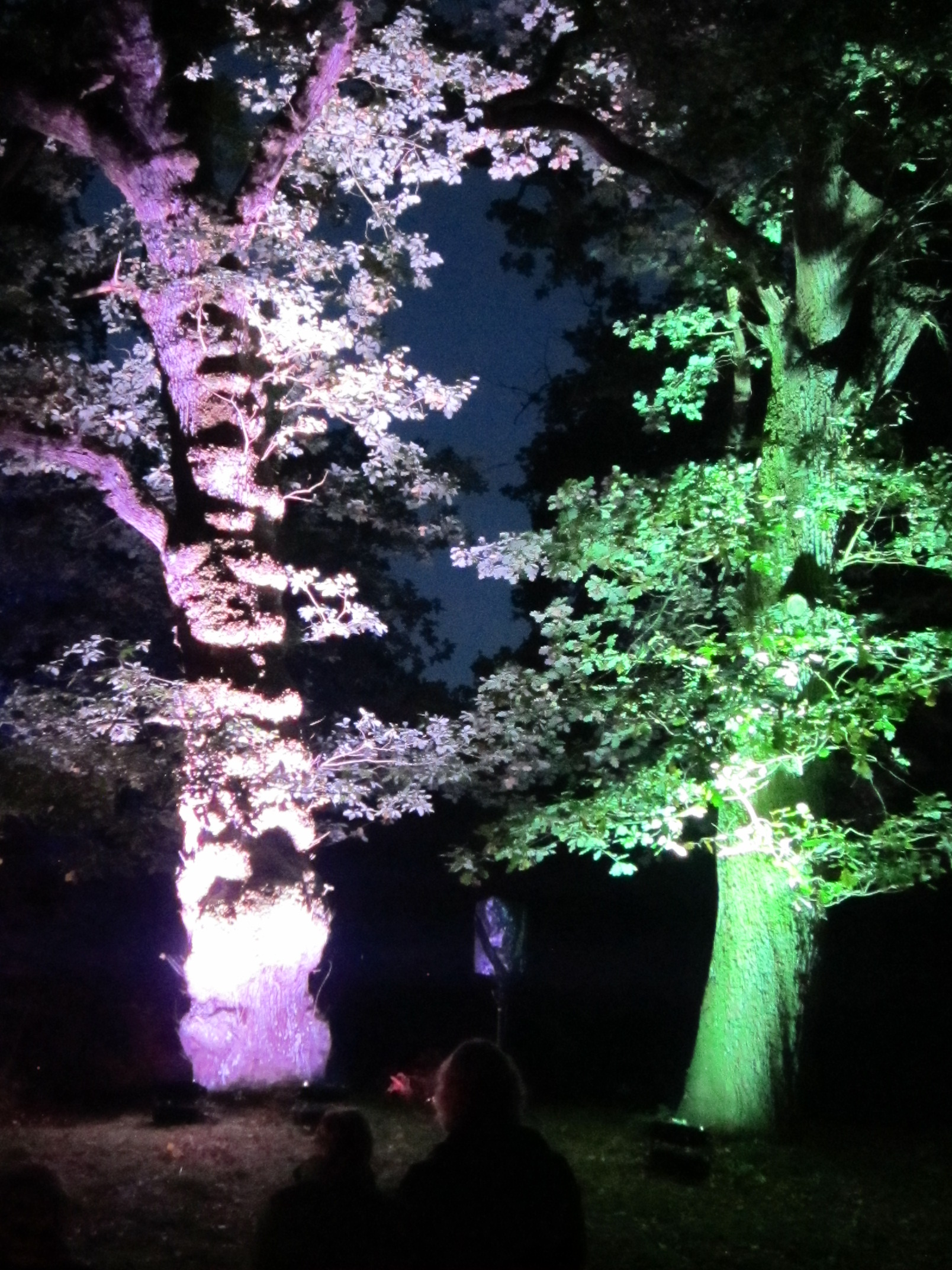 Illumina 2017 im Park des Schlosses Lütetsburg (Landkreis Aurich, Niedersachsen)